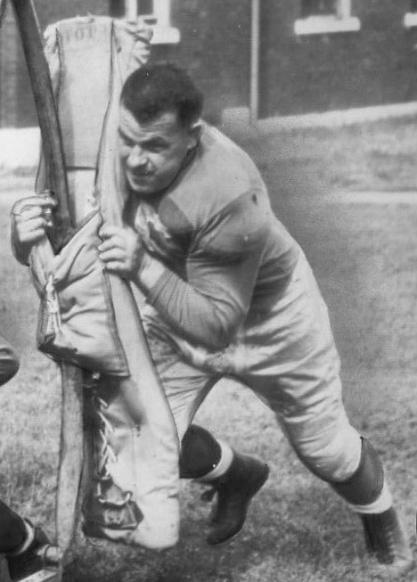 Alex Wojciechowicz Emil Uremovich Szymanski Stan Batinski 1946 Press Photo Lions